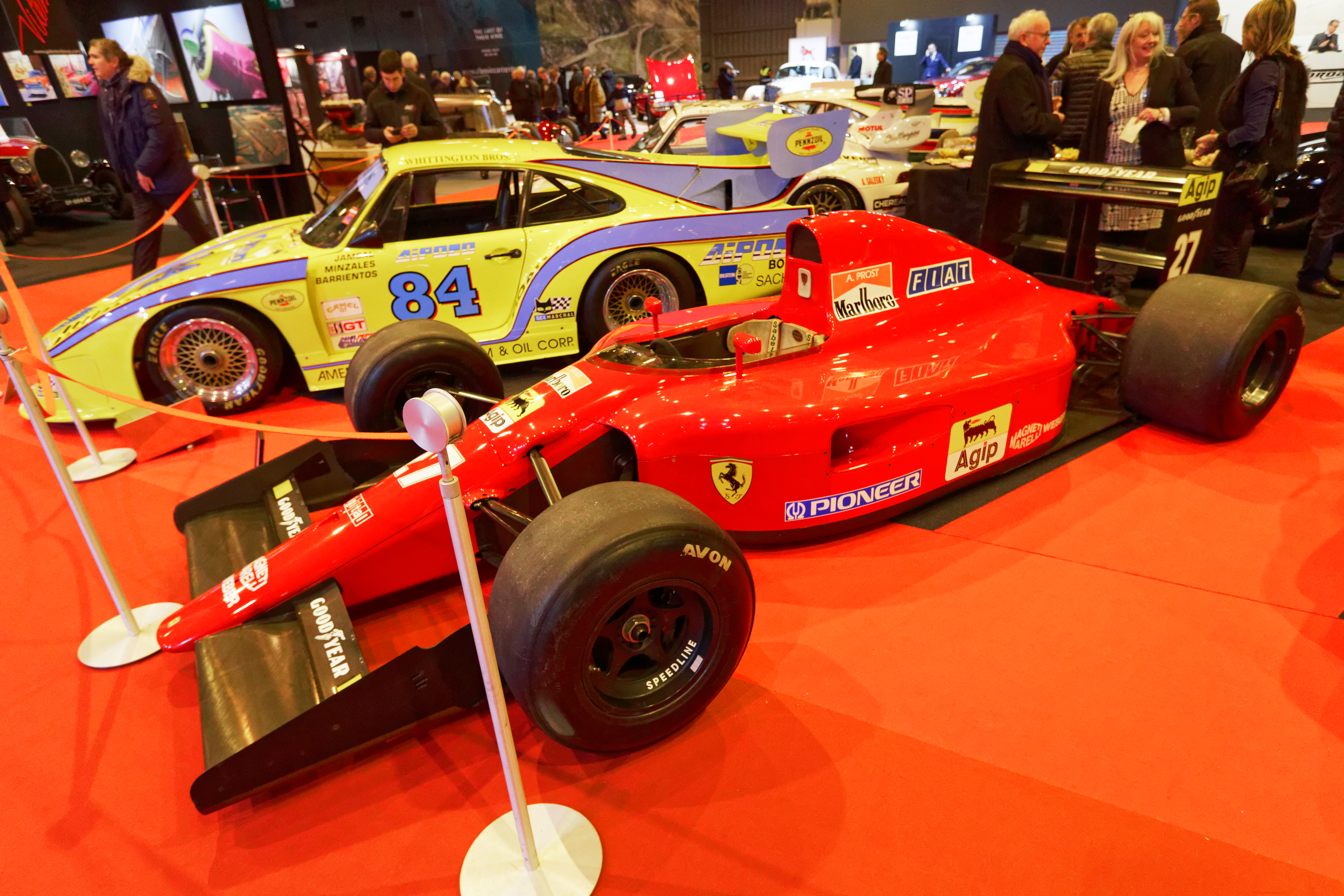 Une Ferrari 642 F1 de 1991 exposée lors du salon Rétromobile 2018.